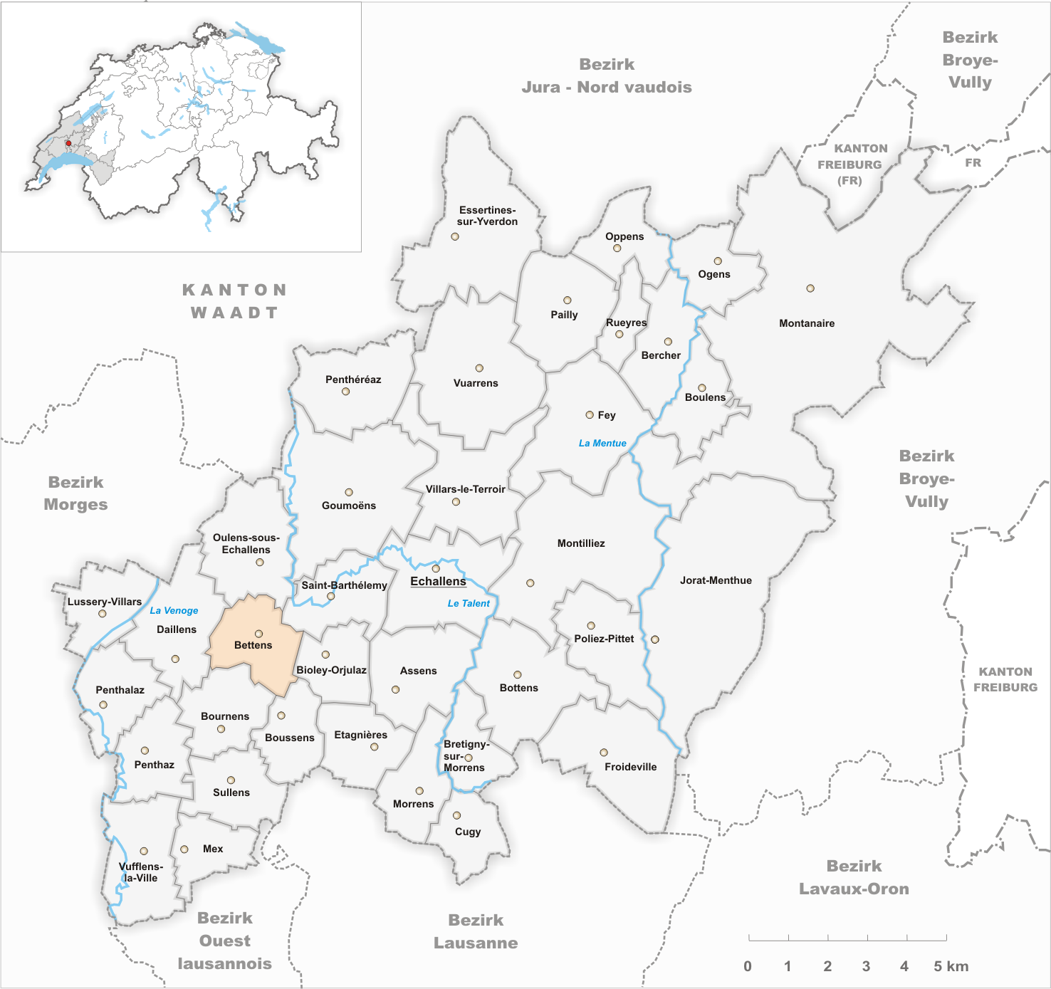 Municipality Bettens